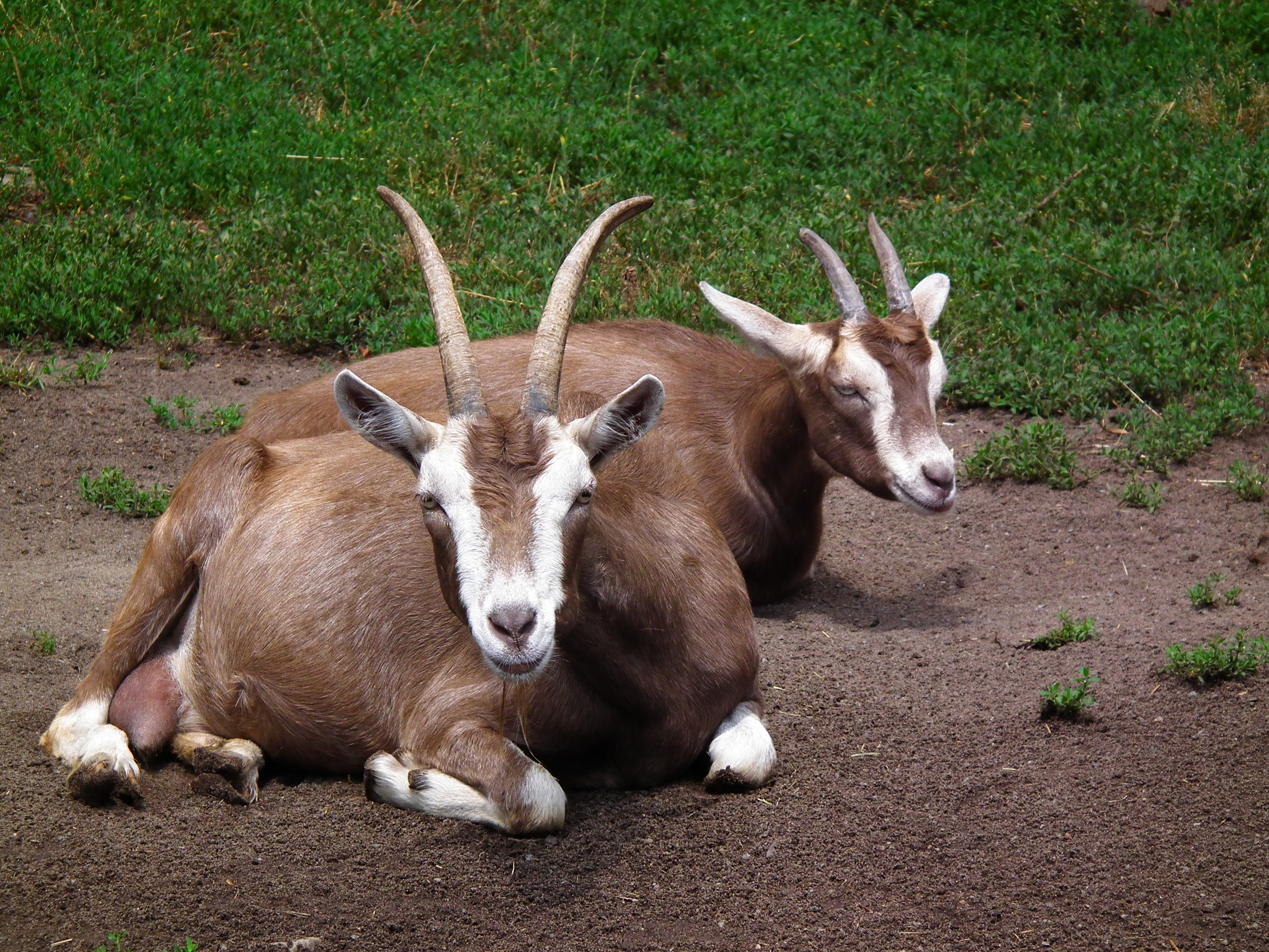 Thüringer Waldziege, aufgenommem im Wildpark Alte Fasanerie in Klein-Auheim (Hessen, Deutschland)